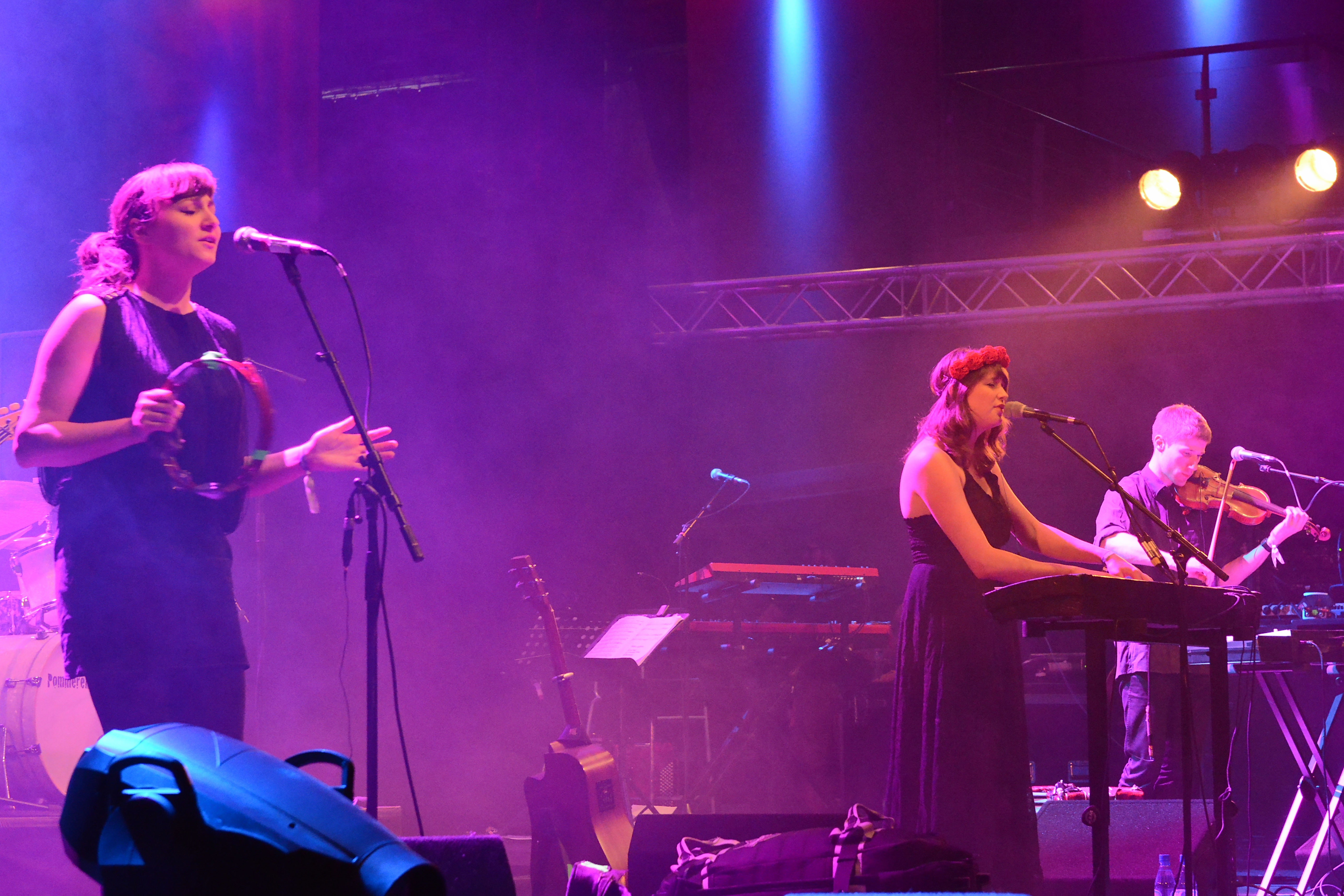 Dear Reader beim Traumzeit-Festival 2014